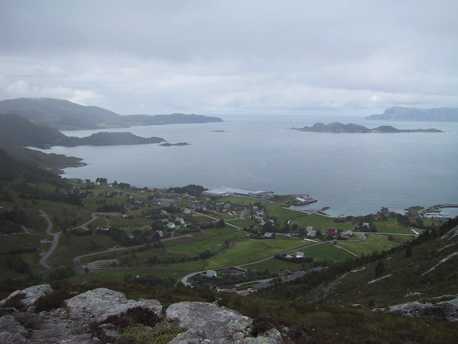 Public Domain: Utsikt til Flatraket, retning nord-vest, ut mot Silda og Stad-havet. Foto: Arne Ødegård, ref.